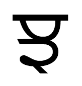 джхуджа